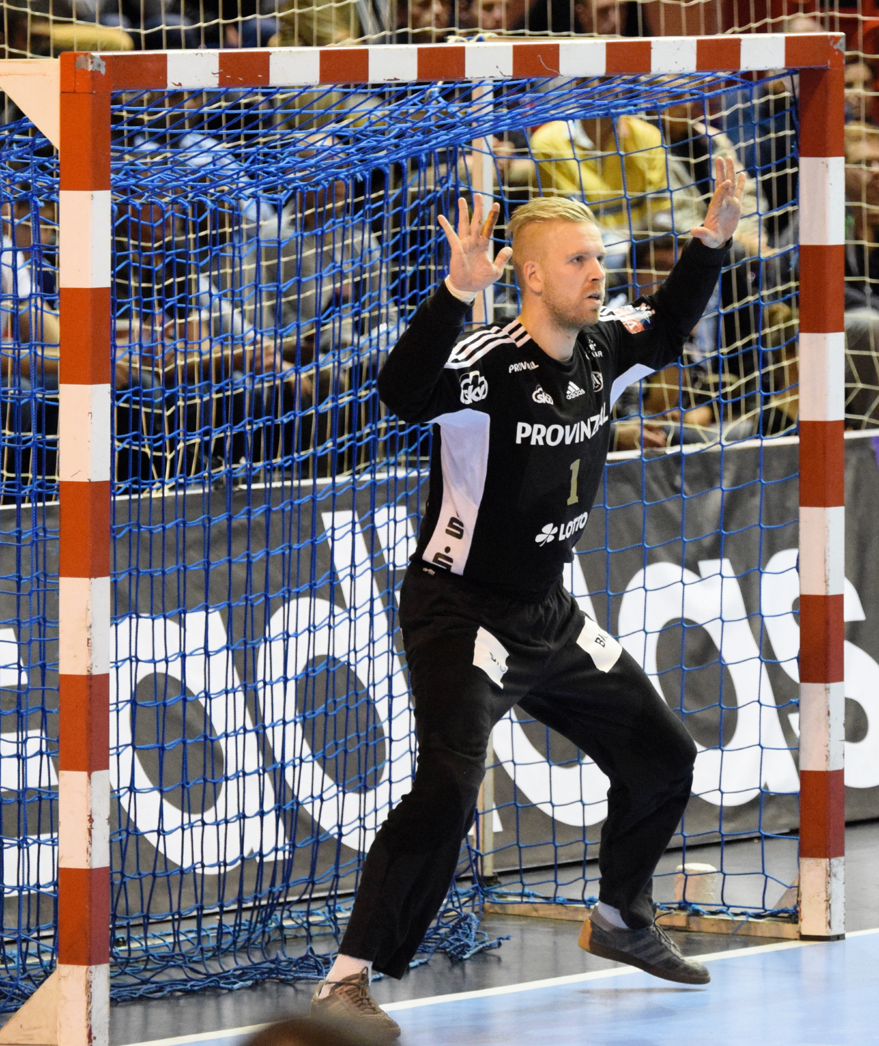 Rencontre de ligue des champions 2014-15 entre le PSG et le club allemand THW Kiel. A la Halle Carpentier, le 16 novembre 2014.